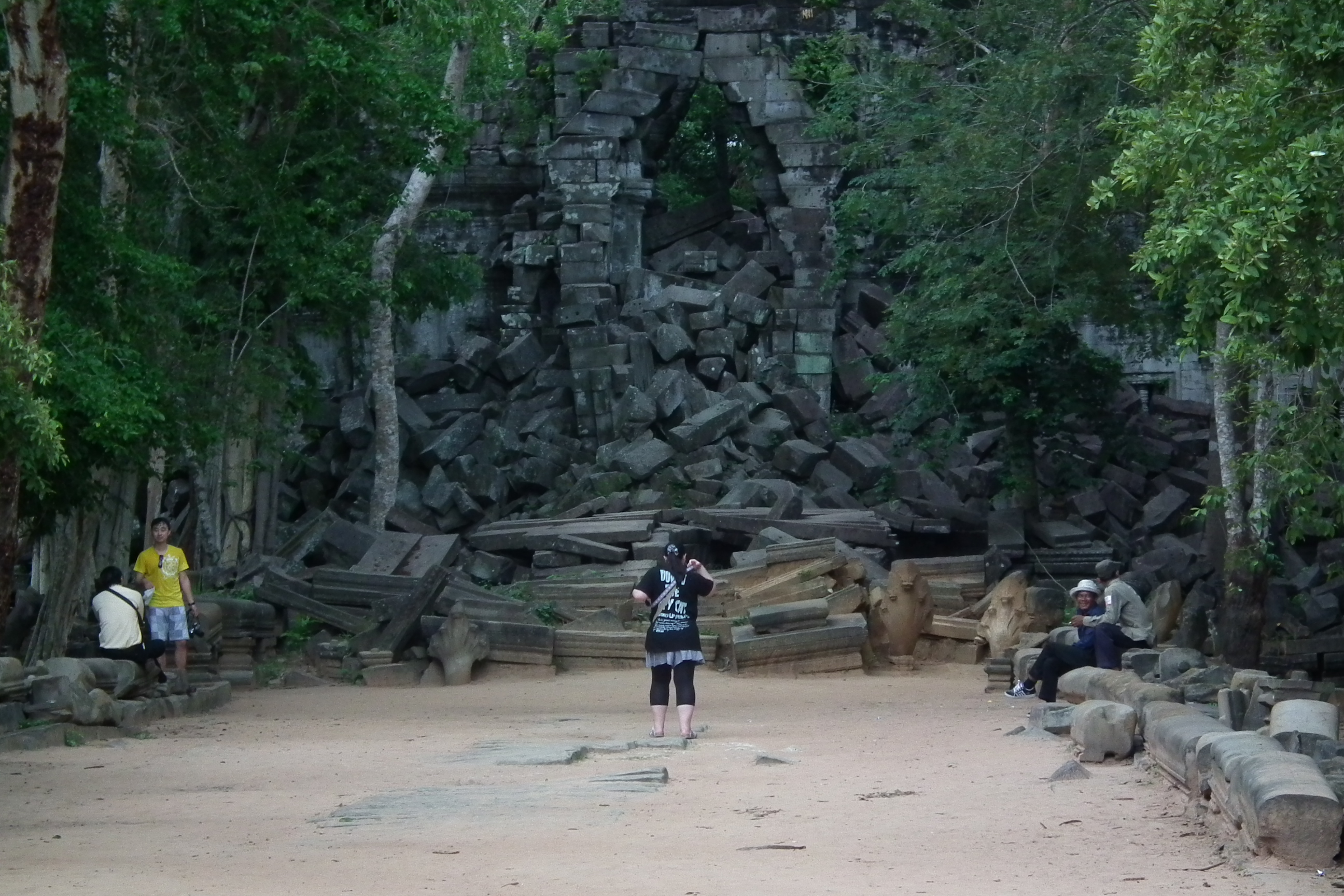 Beng Mealea-Restaurant ប្រាសាទបឹងមាលា ベンメリア アンコール遺跡群